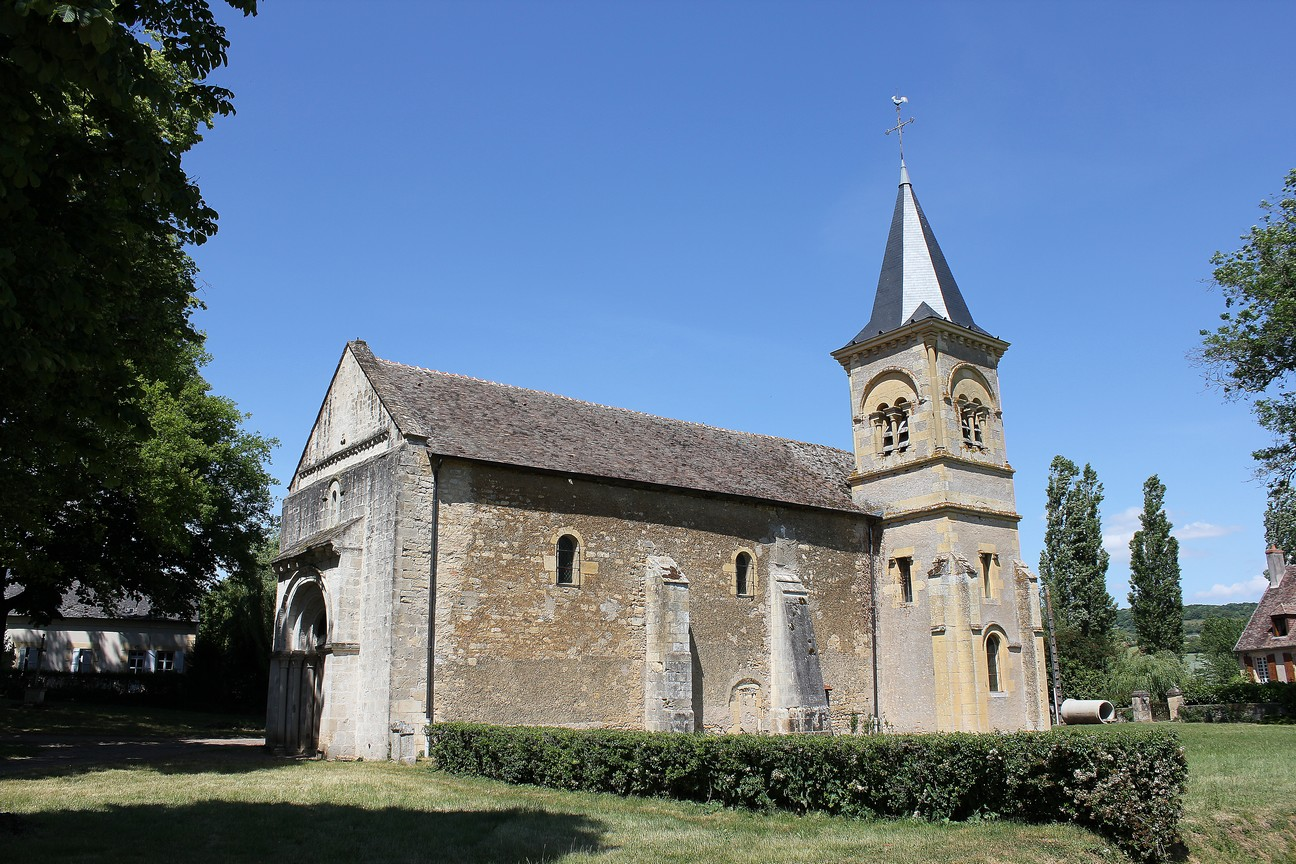 Eglise Saint Blaise de Balleray